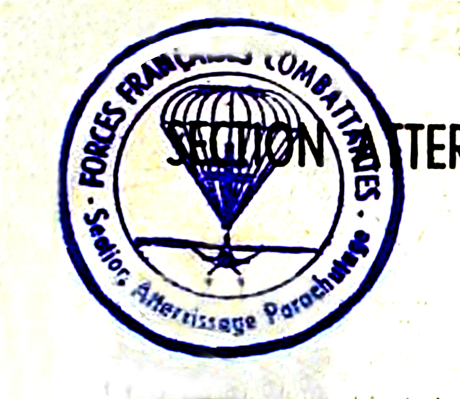 Cachet Service Atterrissage Parachutage R2 Provence